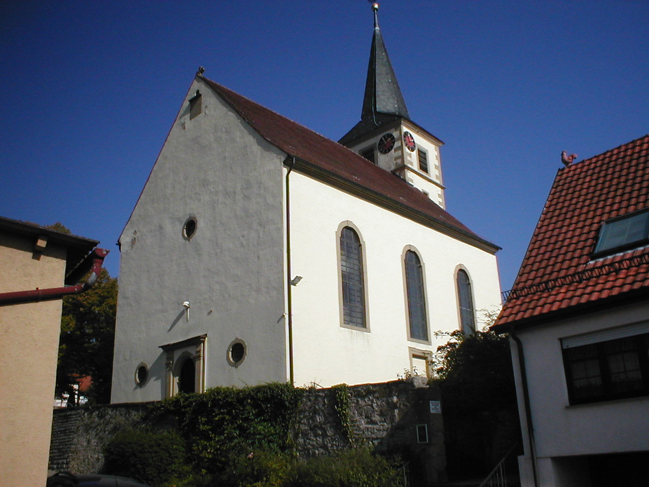 Evangelische Kirche in Kochersteinsfeld, renoviert 1733